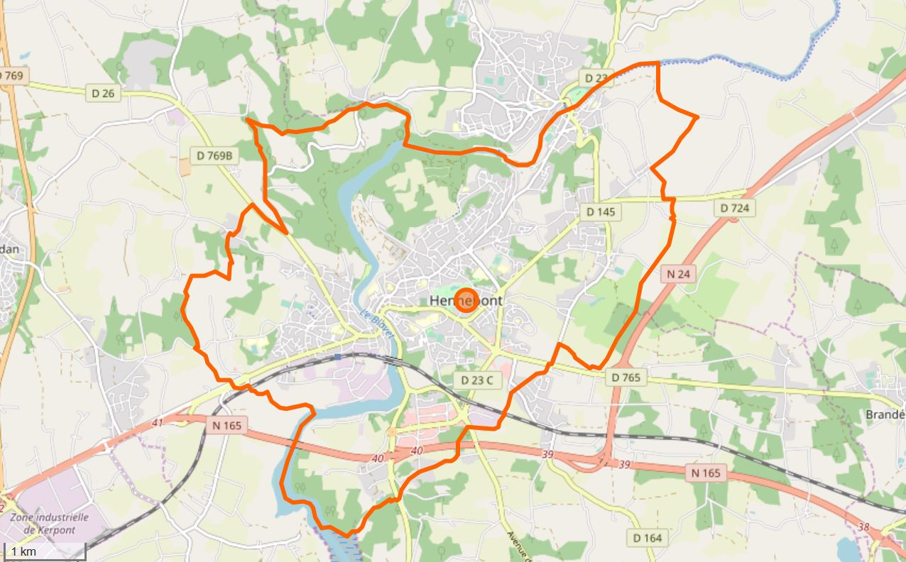 Cette carte a été créée à partir des données du projet Openstreetmap. This map may be incomplete, and may contain errors. Don't rely solely on it for navigation.